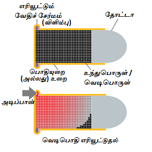 விளிம்படி வெடிபொதியின் வரைபடம்